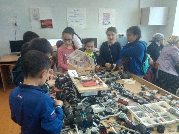 Башҡортса: Бөрйән районы, Әбделмәмбәт урта дөйөм белем биреү мәктәбе